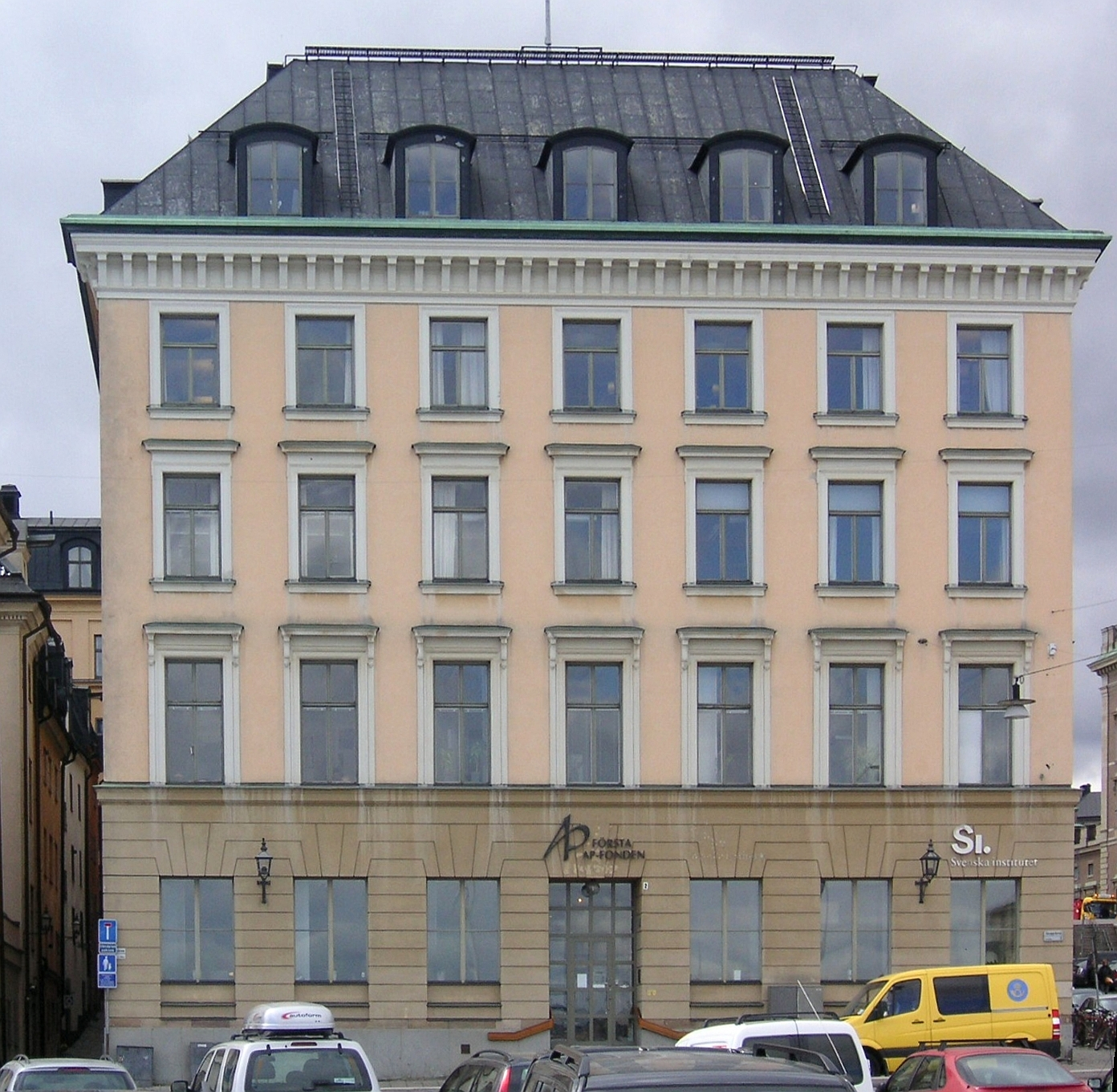 Skeppsbron nr 2 i Stockholm